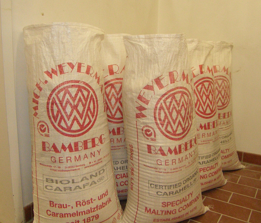 Mehrere Säcke Malzschrot für das Einmaischen des HannoverWikiRed